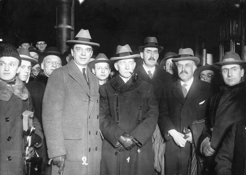 Ankunft der ersten Sachverständigen-Kommission in Berlin. Die Führer der Sachverständigen-Kommission, der amerikanische General Charles Dawes (1) und Orren D Young (2) der bekannte amerikanische Finanzmann.